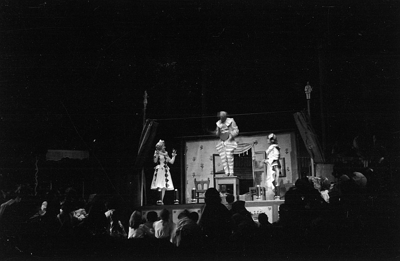 Original image description from the Deutsche Fotothek Szenenbilder